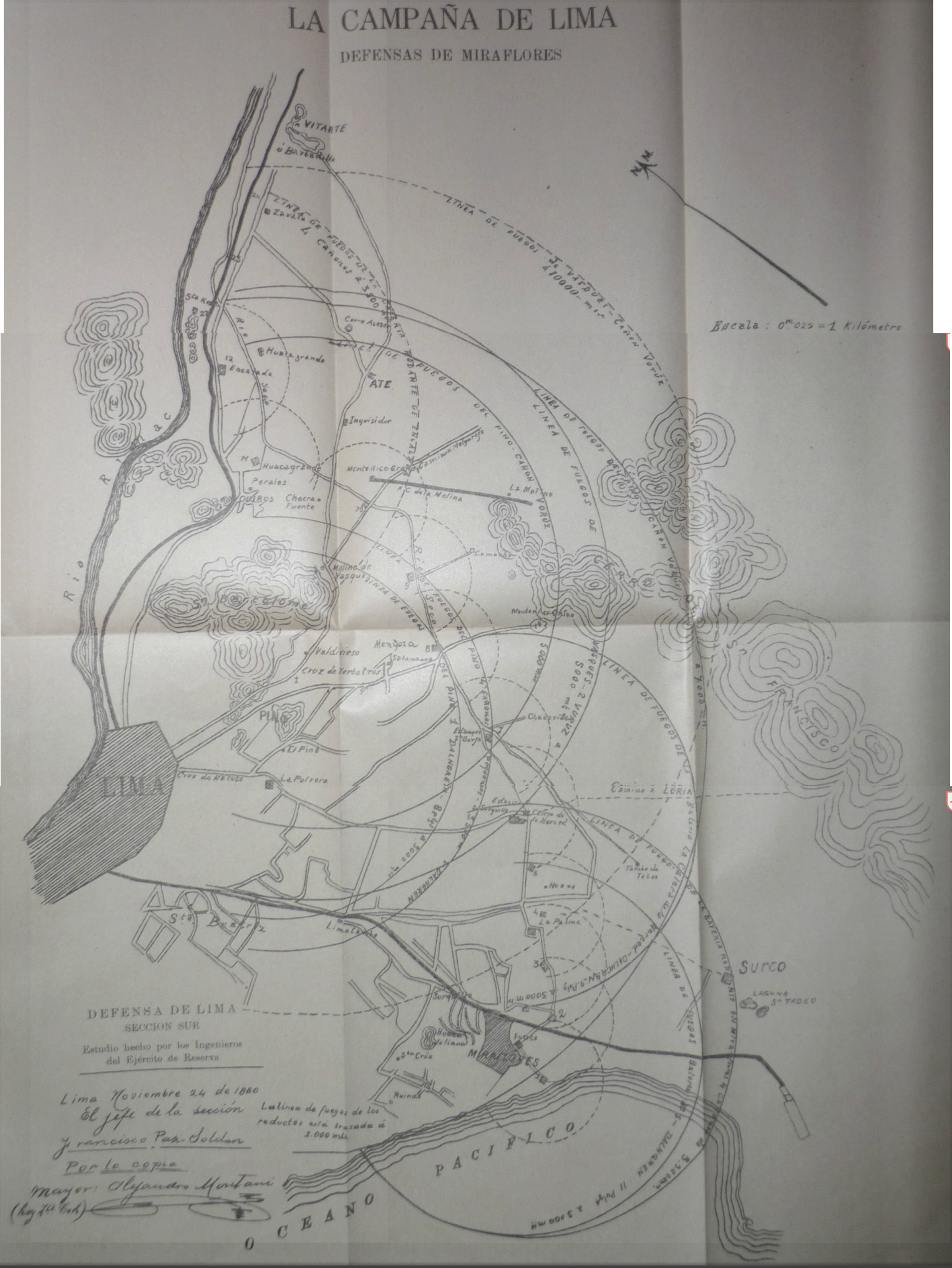 Batalla de Chorrillos, 1881